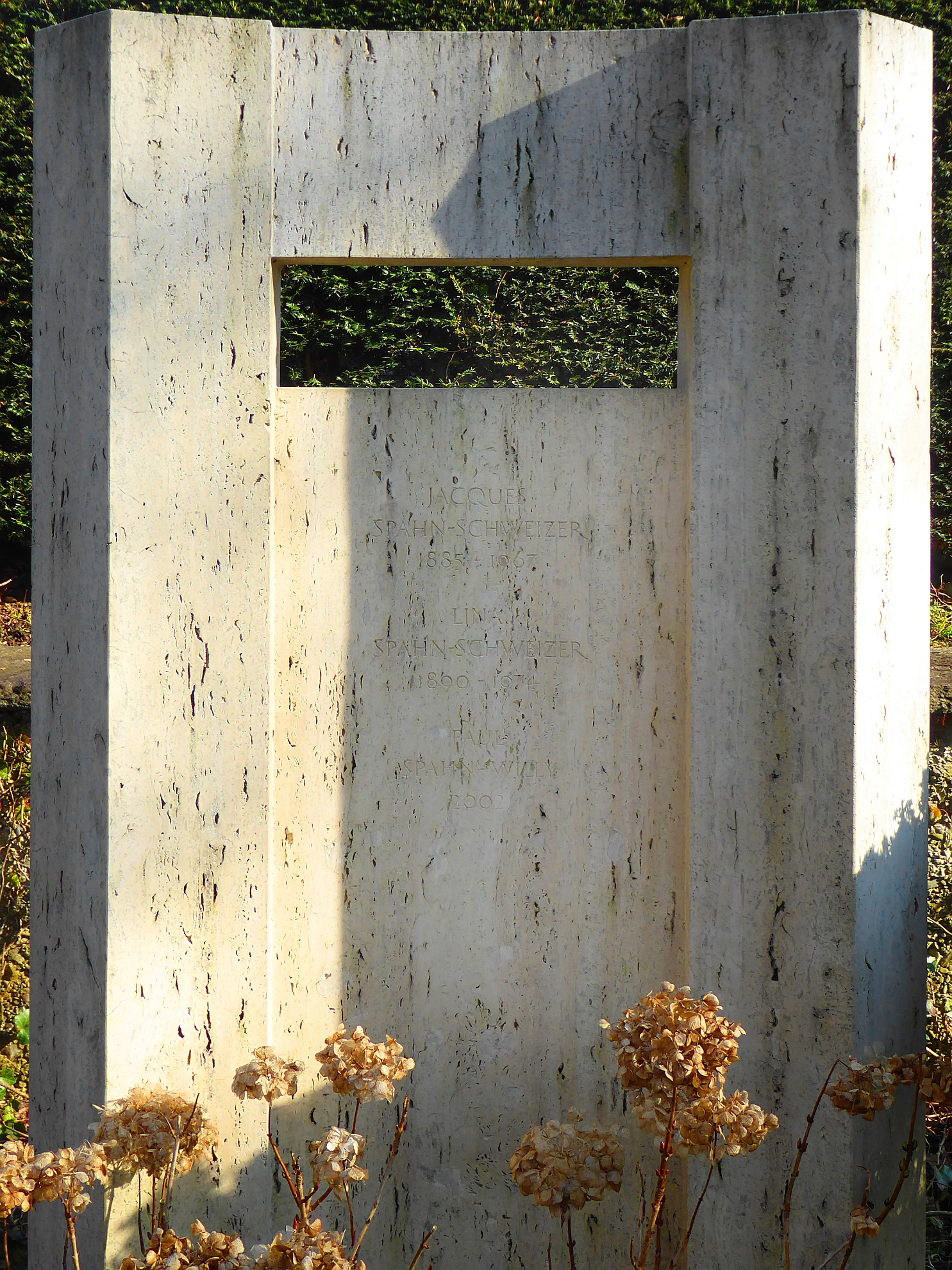 Paul Span-Willy (1914–2002) Schauspieler, Nachrichtensprecher, Grab auf dem Friedhof Hörnli, Riehen, Basel-Stadt